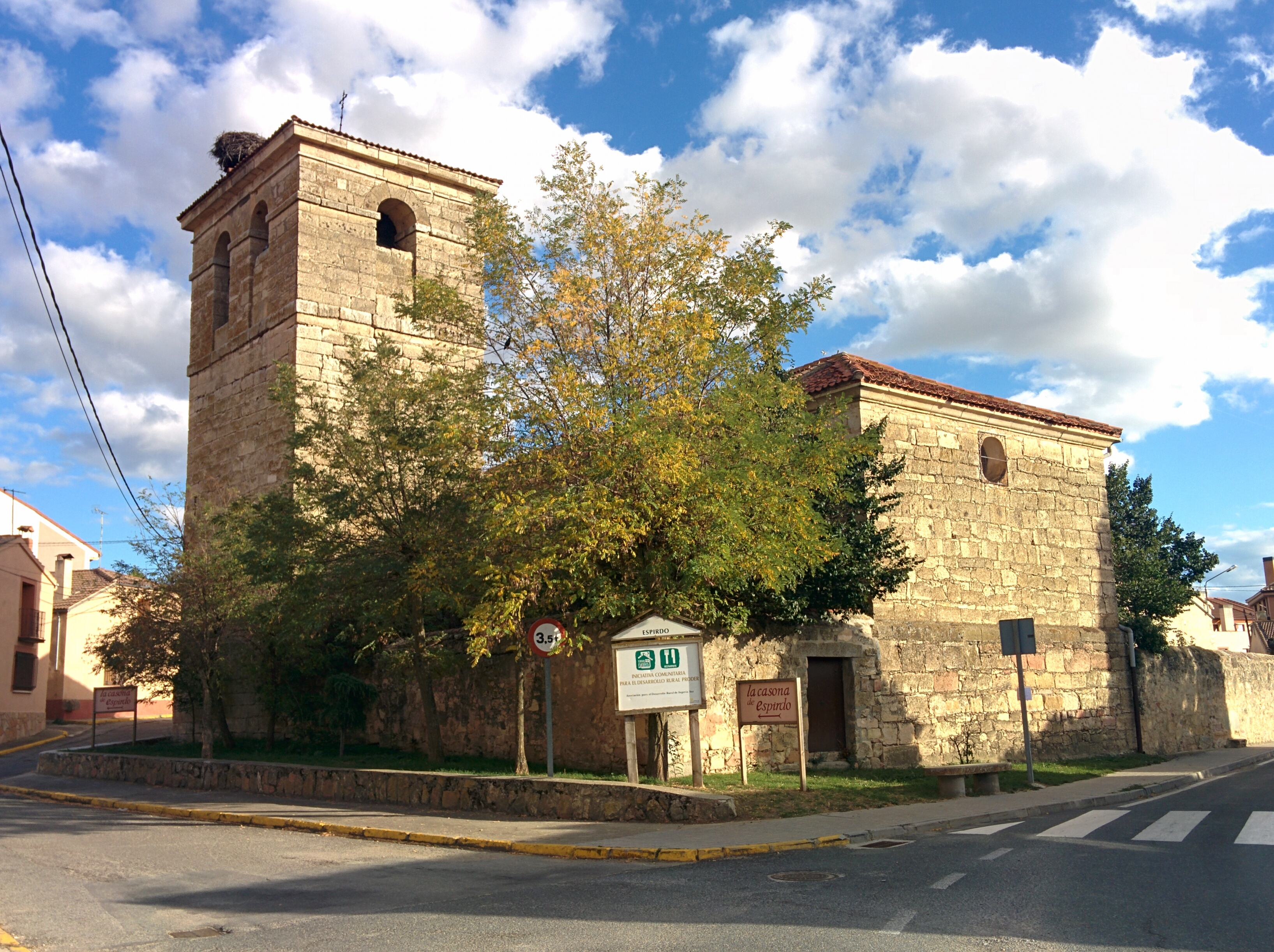 Iglesia de San Pedro, Espirdo (Segovia, España).